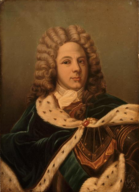 Louis de Rouvroy, duc de Saint-Simon, mémorialiste (1675-1755)